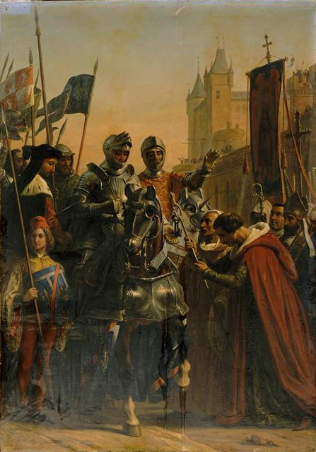 Le comte de Dunois recevant les clefs de la cité présentées par les jurés de la ville de Bordeaux.